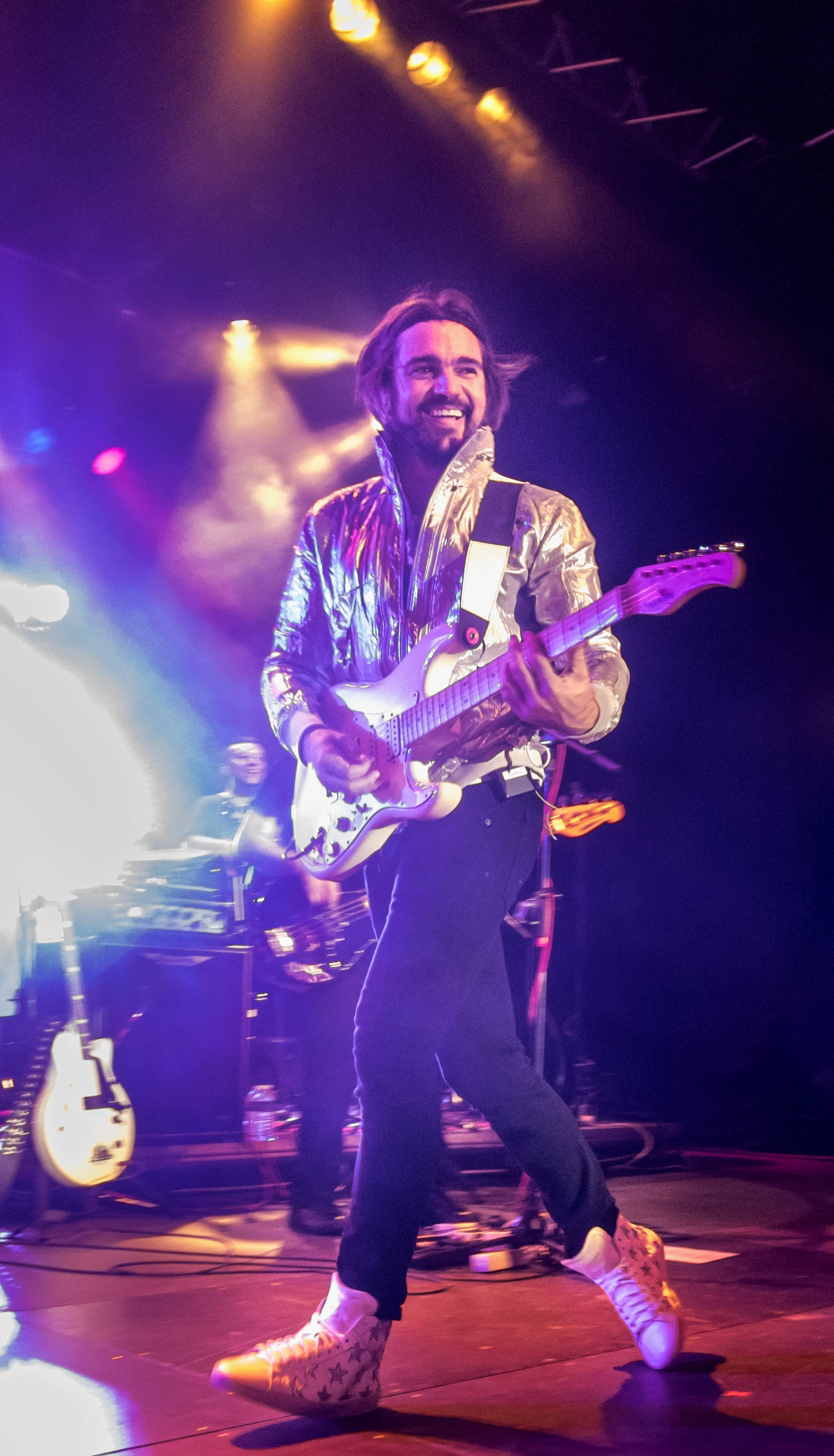 Bilder vom ZMF 2015 JUANES am 18. Juli 2015